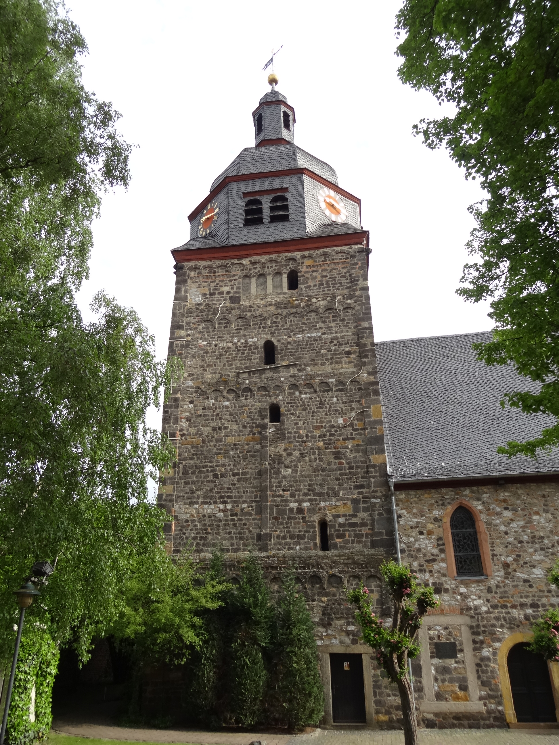 Evangelische Pfarrkirche (Nieder-Weisel)